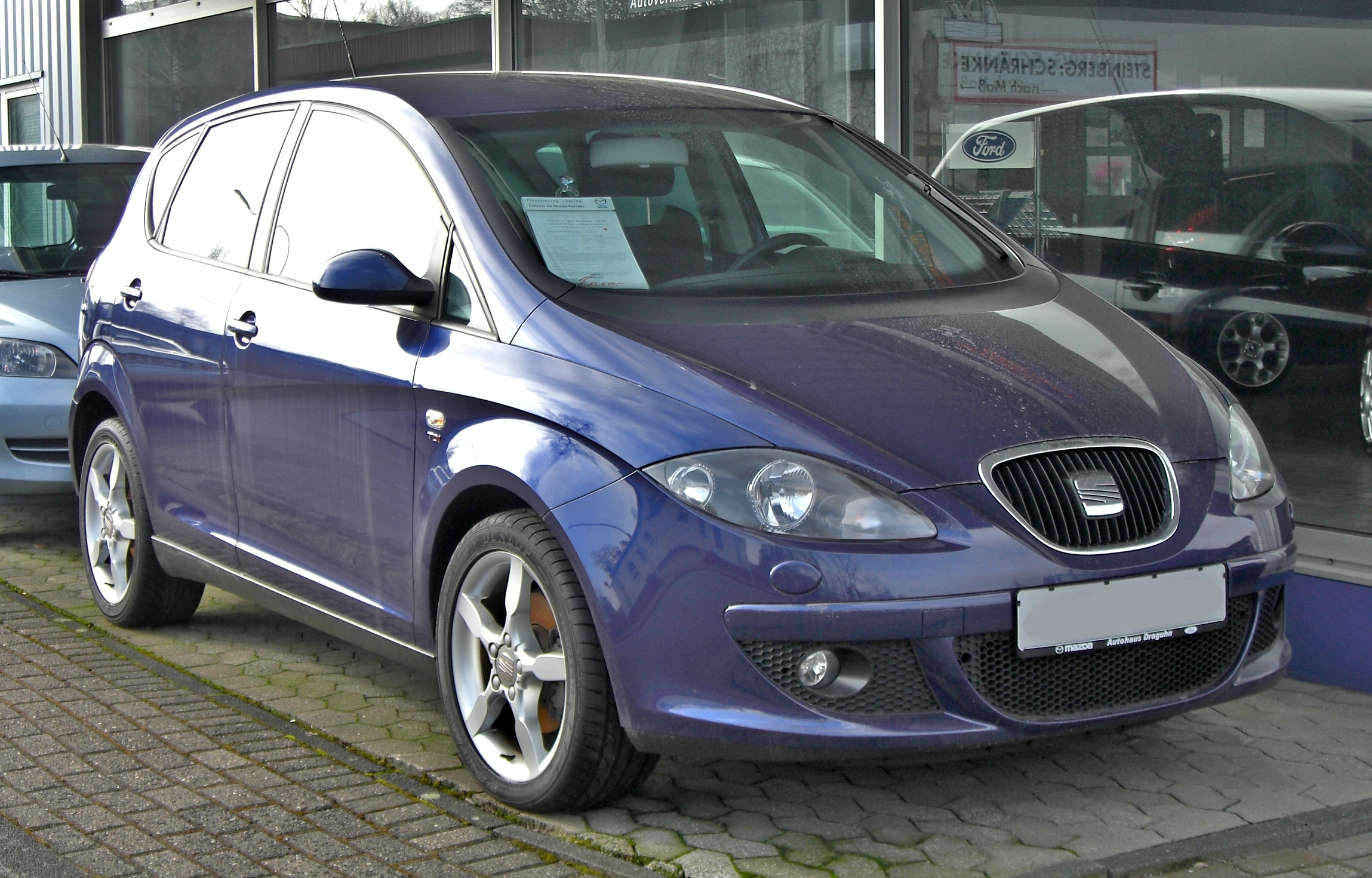 Seat Altea